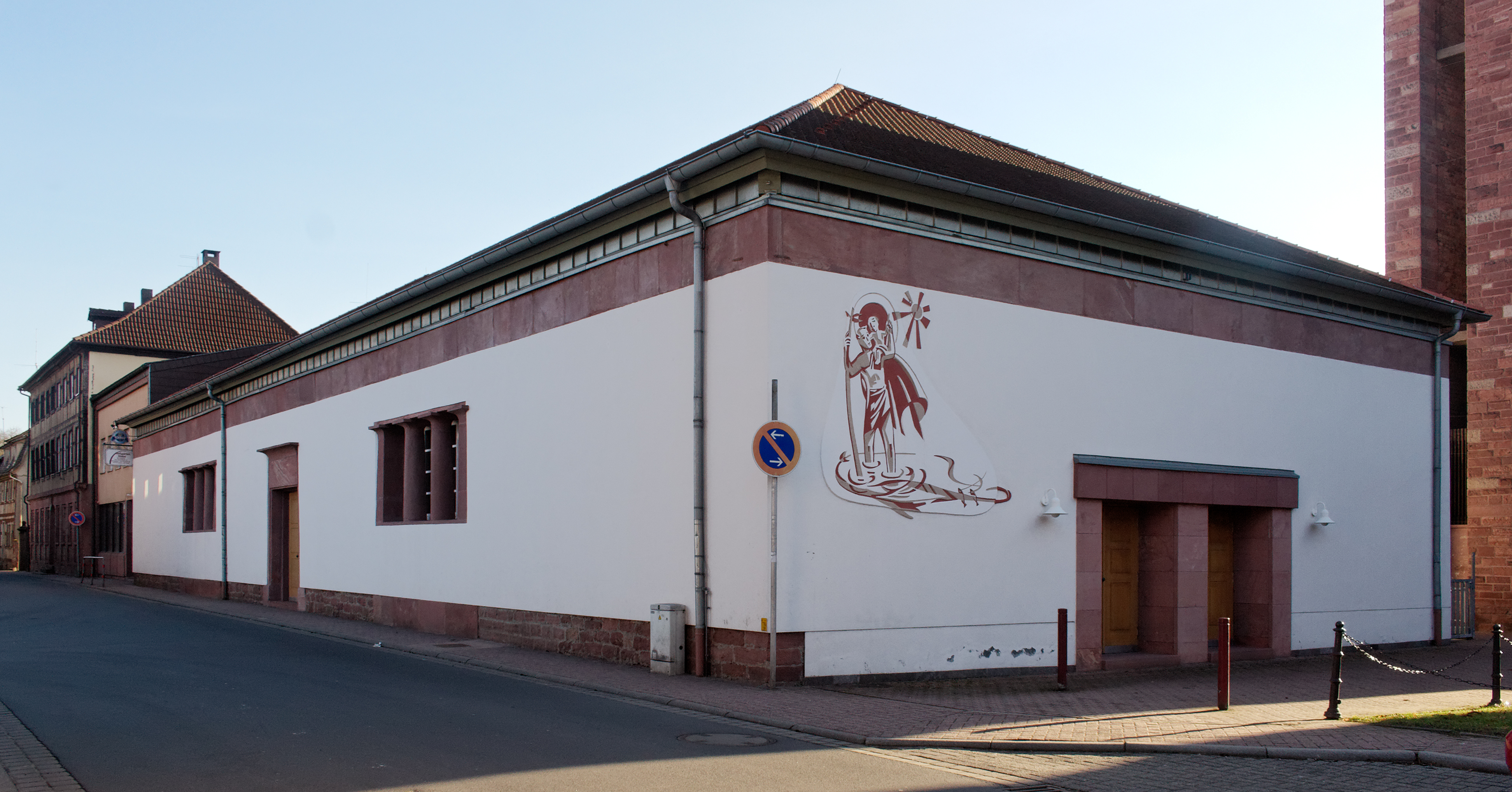 Ehemaliger Reitstall in Kleinheubach (Bayern), erbaut 1812 von Architekt Wolfgang Streiter für die Fürstenfamilie zu Löwenstein. Das Gebäude wurde bis 1930 als Reithalle genutzt. Seit 1988 im Besitz der Gemeinde. Nach Renovierung 1996 als Restaurant und Veranstaltungssaal "Hofgarten" genutzt.